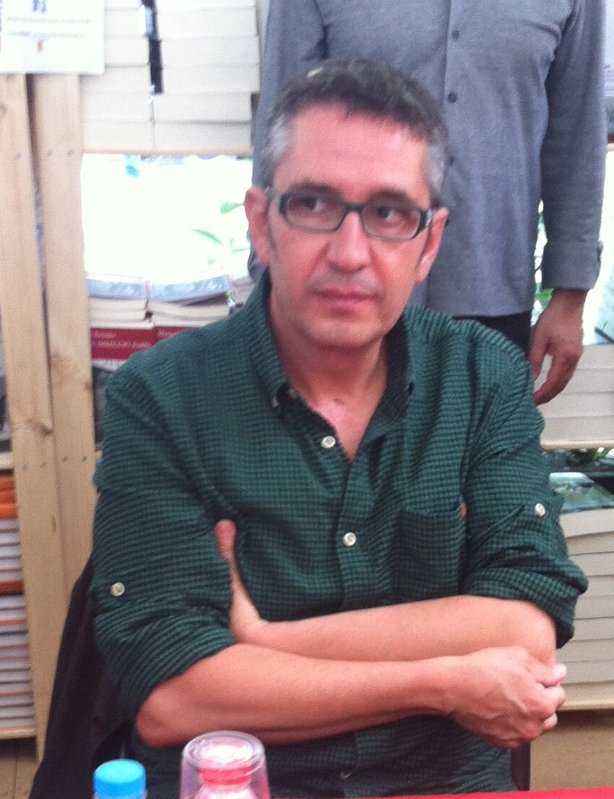 Manuel Baixauli- Diada de Sant Jordi 2014